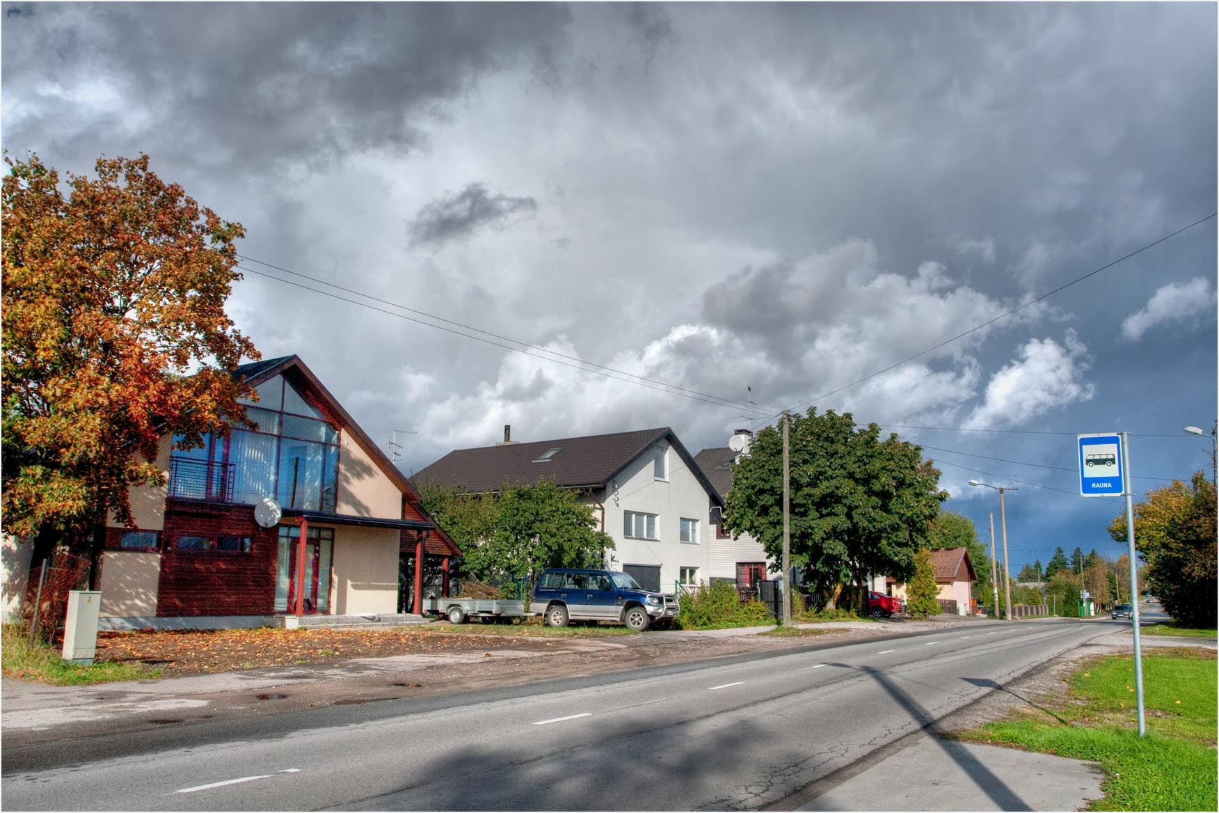 Tõkke street